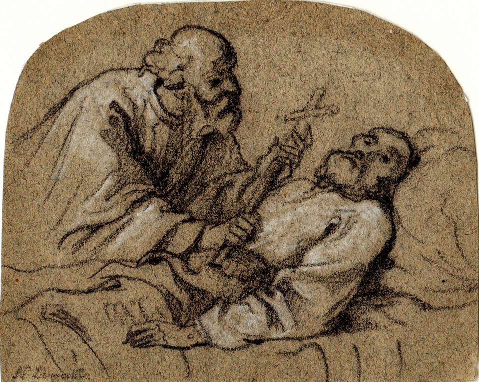 Lemasle L.N. - B&W stone - La mort de François-Xavier - 14,5x11,3cm